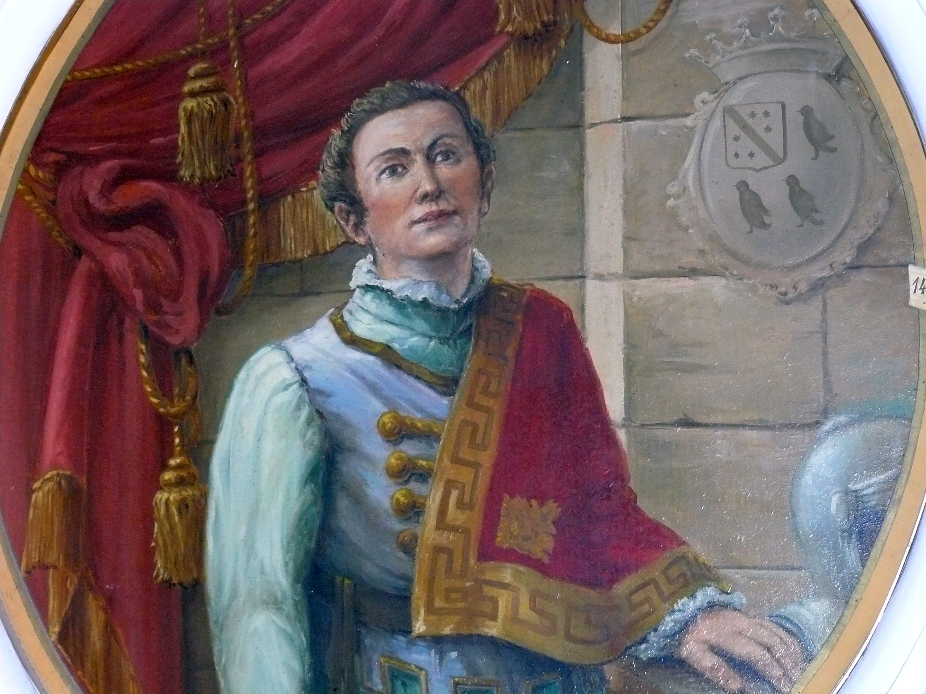 Tela di Francesco Carrino, pittore tarantino che l'ha realizzata agli inizi degli anni Sessanta per la chiesa Santa Maria la Nova di Pulsano (Taranto), e raffigura il capitano Giovanni Antonio Delli Falconi (De Falconibus) che morì a Otranto nella guerra del 1480 contro gli invasori turchi.